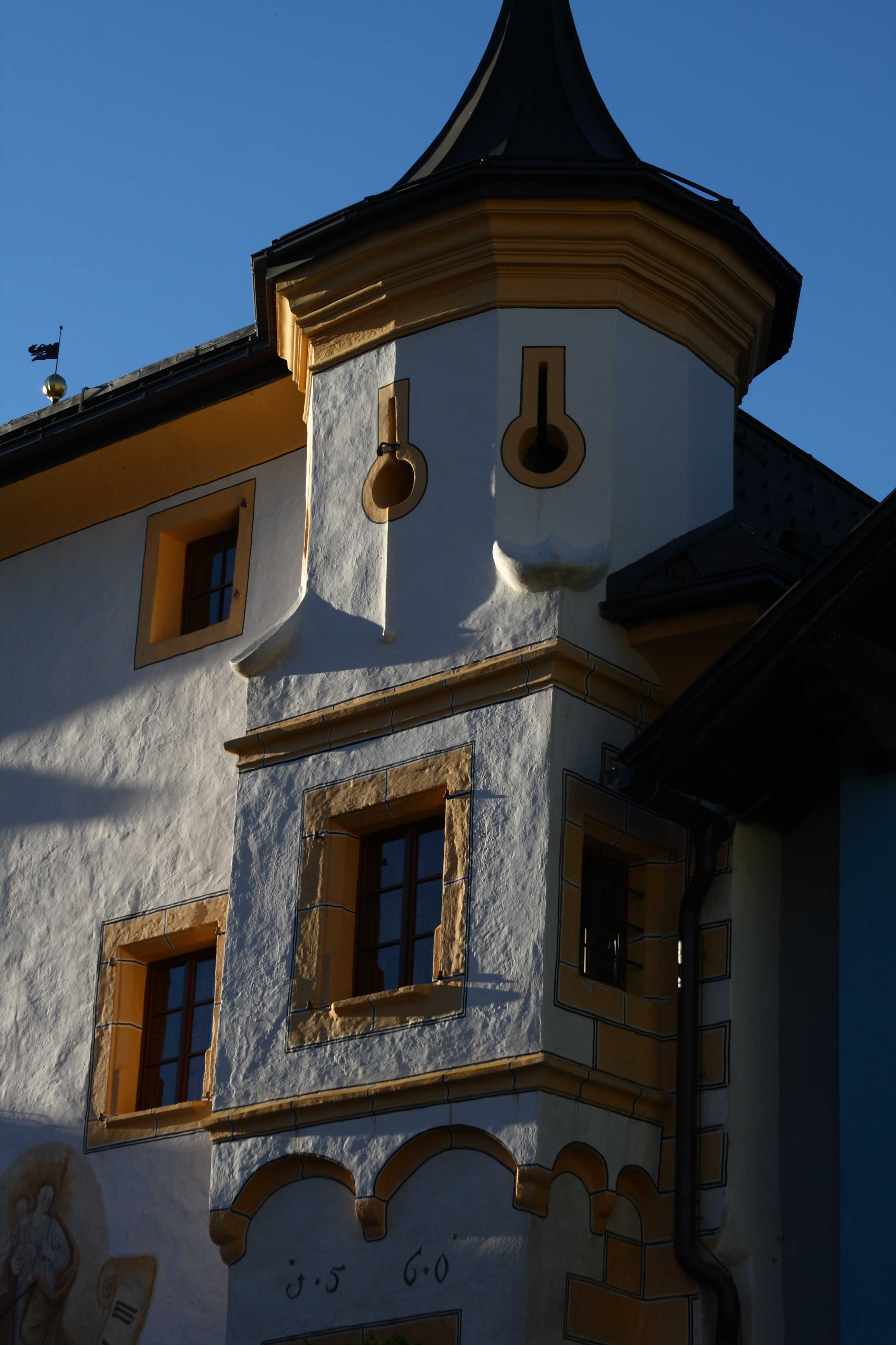 Rathaus